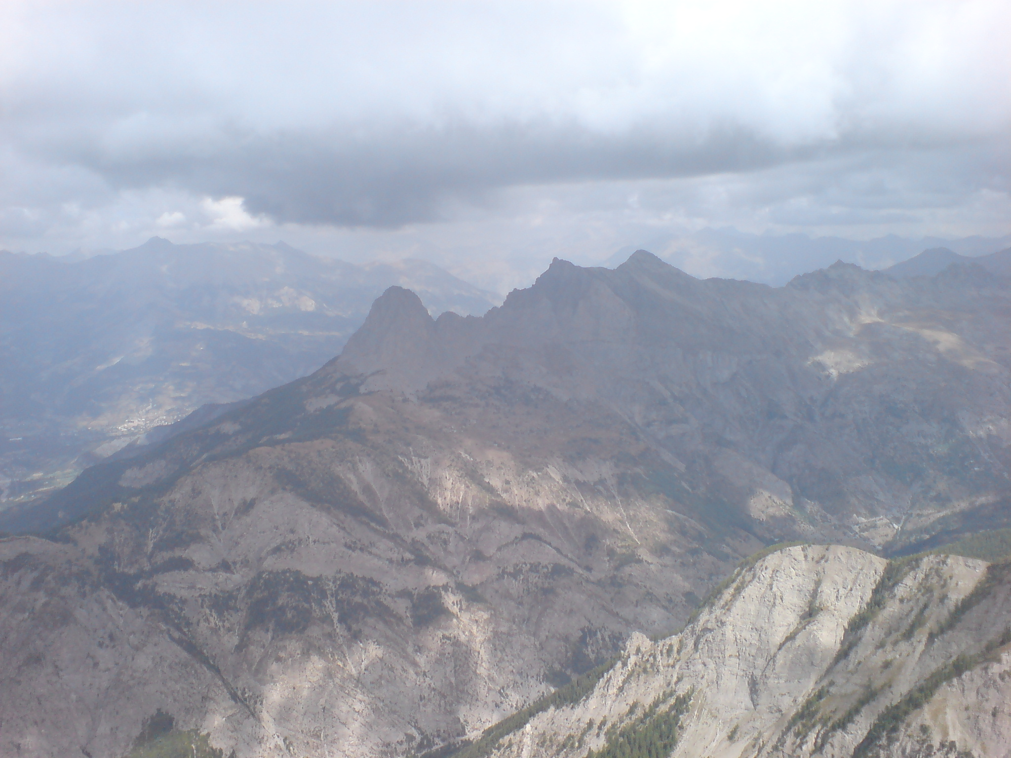 Chapeau de Gendarme (Alpes-de-Haute-Provence), vu du Grand Cheval de Bois (même département)